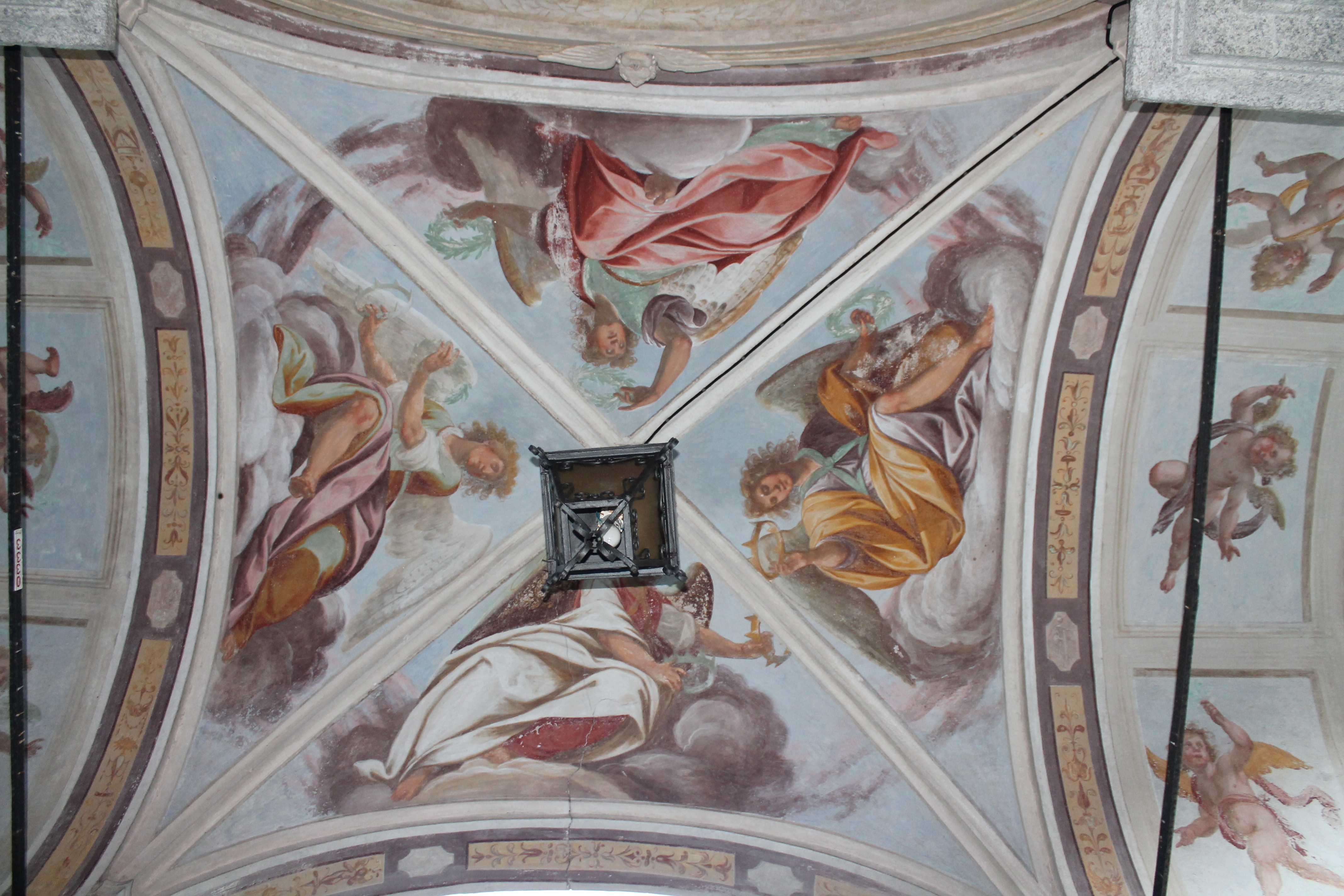 Cappelle Sacro Monte This is a photo of a monument which is part of cultural heritage of Italy.